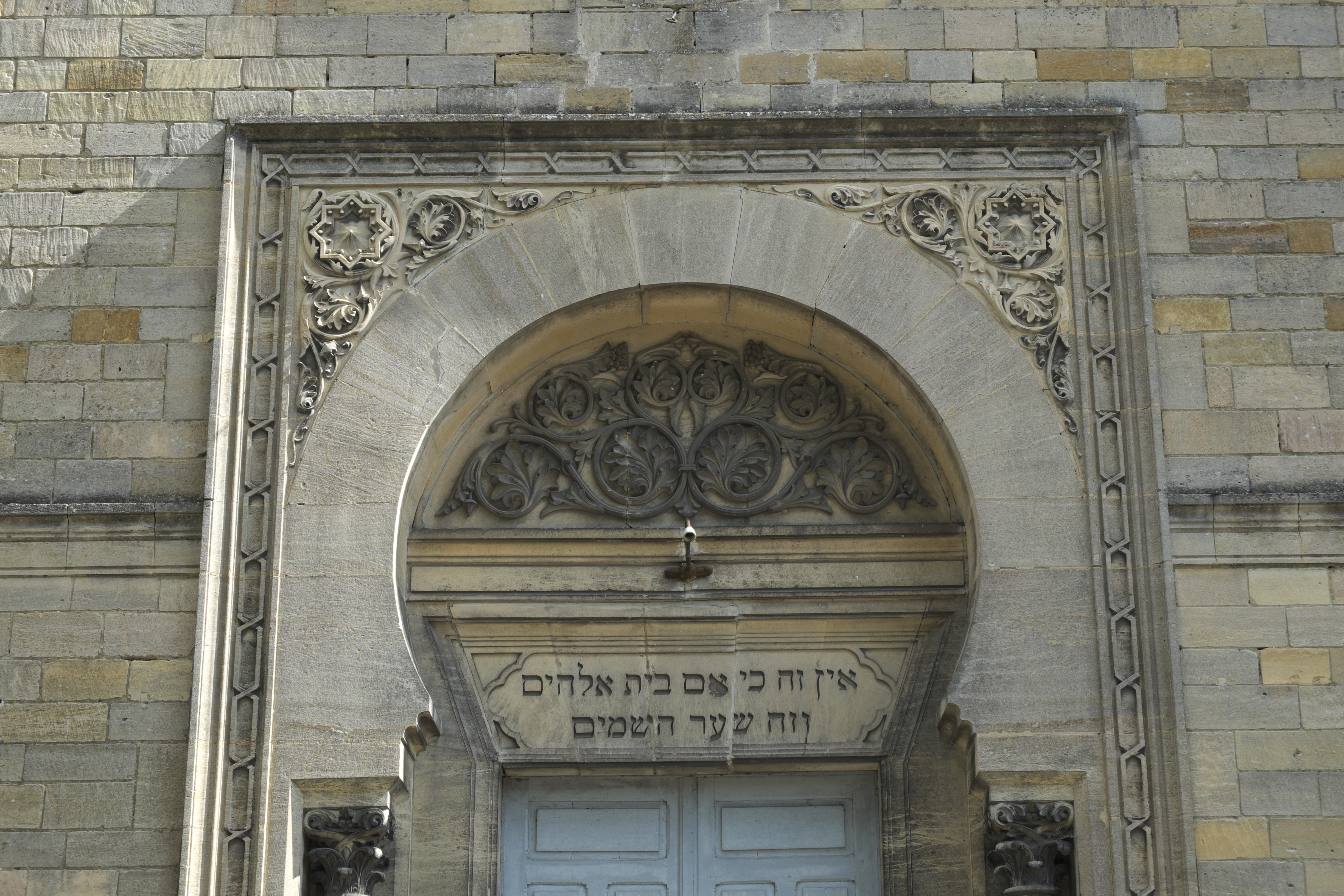 Synagoge in Bar-le-Duc im Département Meuse (Lothringen/Frankreich), Portal mit hebräischer Inschrift .